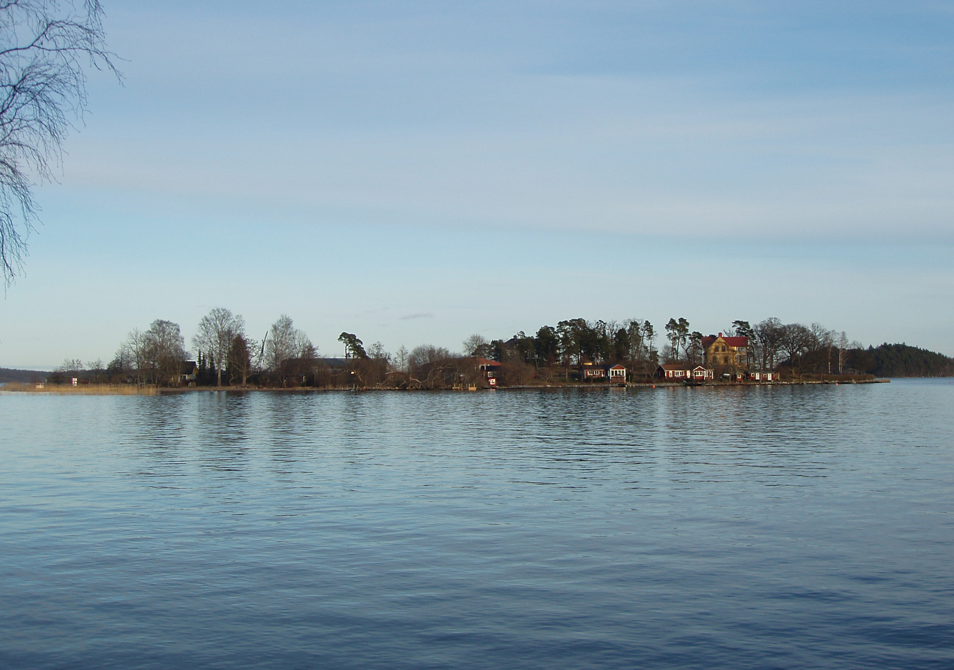 Duvholmen, an island east of Elfvik, Lidingö.